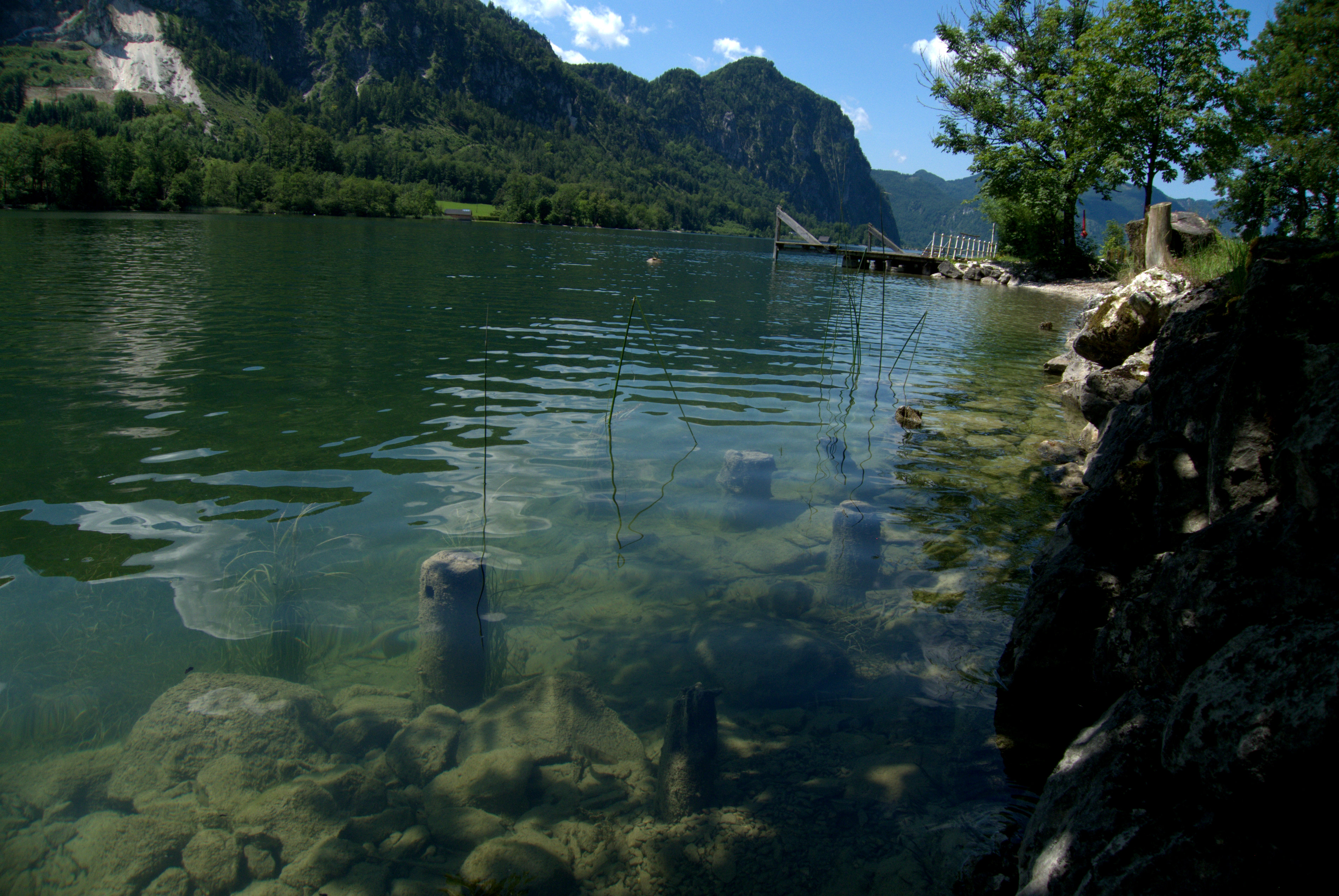 Pfahlbaustation See, Uferbereich